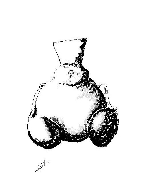 Paint.